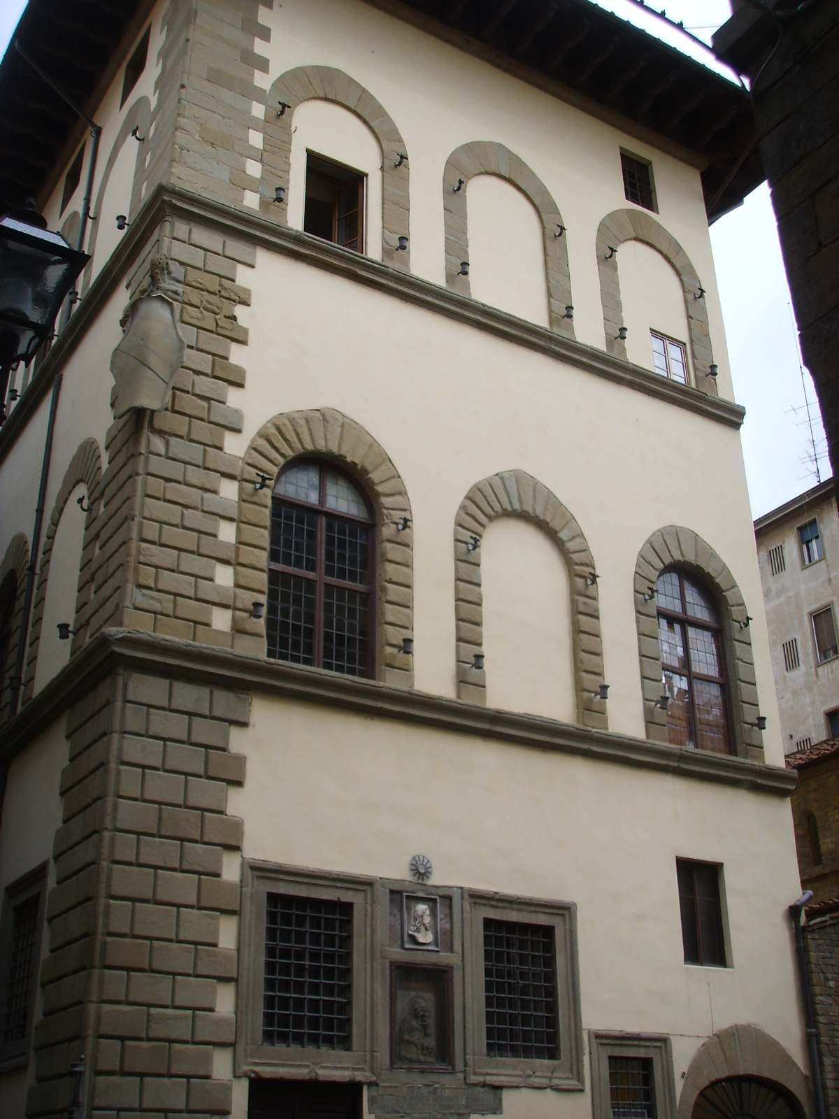 Palazzo Borgherini-Rosselli del Turco 02